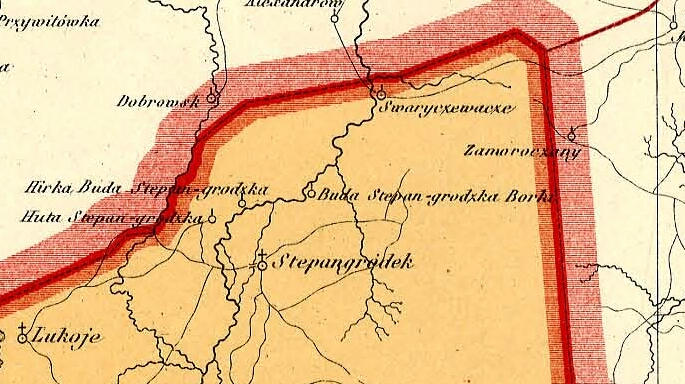 Карта, Степангород